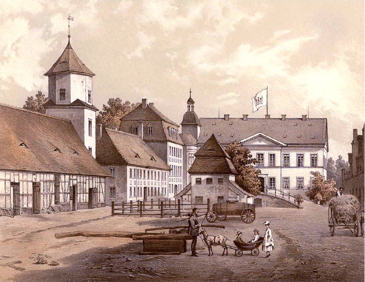 Schloss Altjeßnitz, Kreis Bitterfeld, Provinz Sachsen